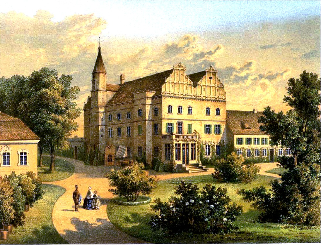 Schloss Klein-Tschirnau, Tschirne, Alteichen, Kreis Glogau, Provinz Schlesien